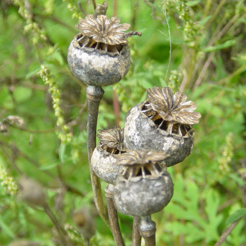 Fruchtkapseln im Herbst